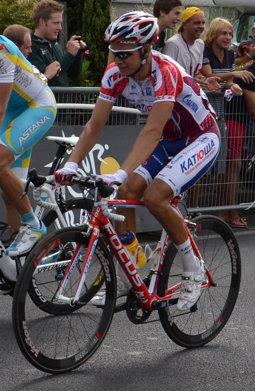 Egor Silin lors de l'arrivée de la 15e étape du Tour de France 2011 à Montpellier.